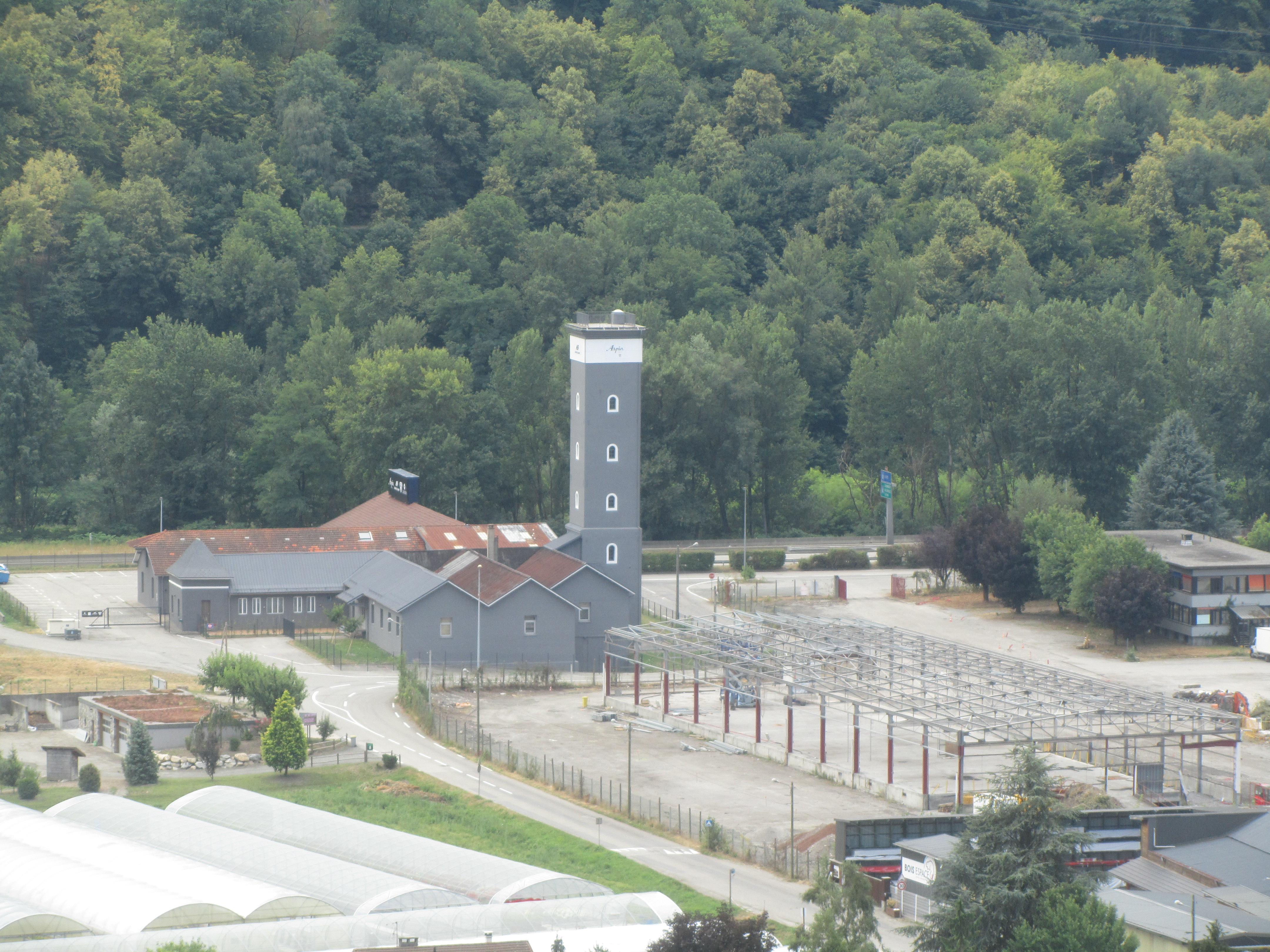 La tour héritée des salines puis repère pour la fonderie